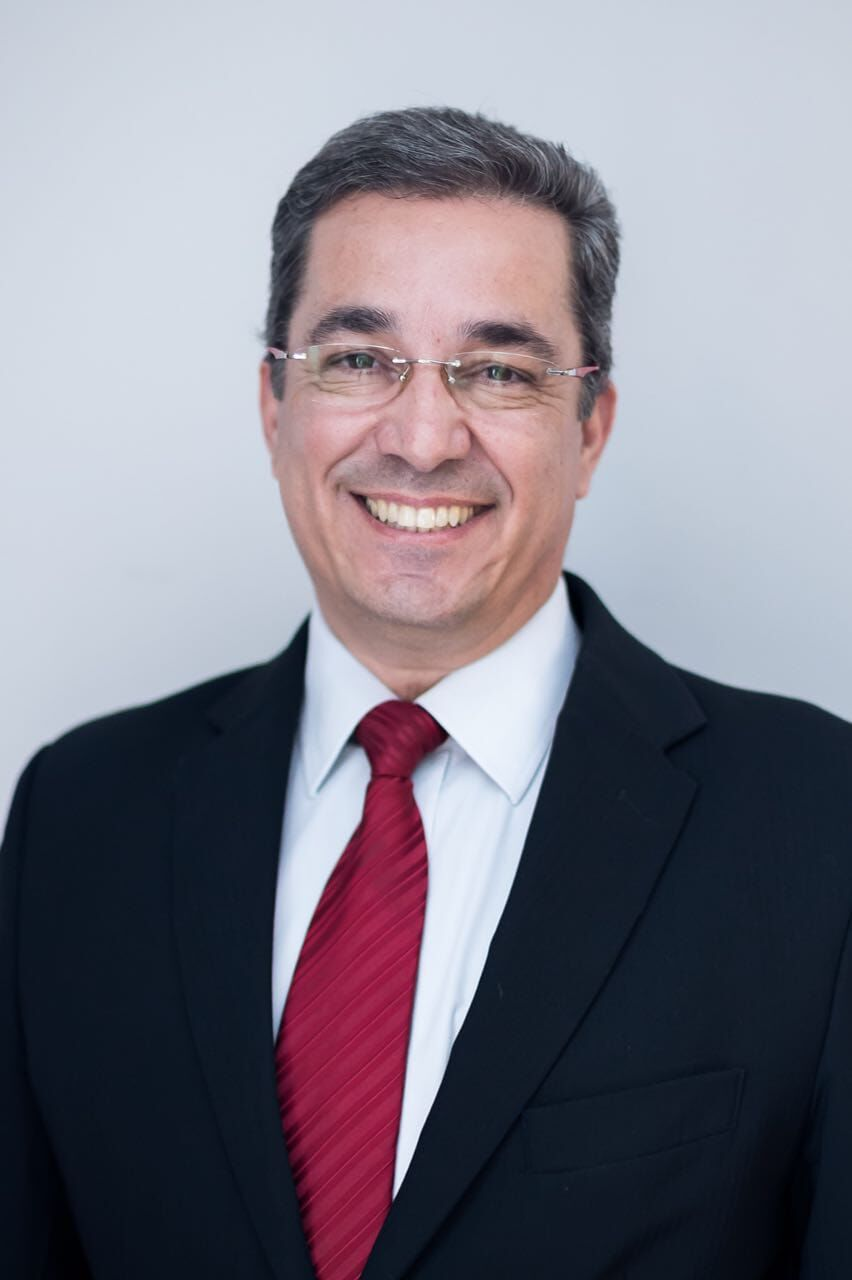 Deputado Federal